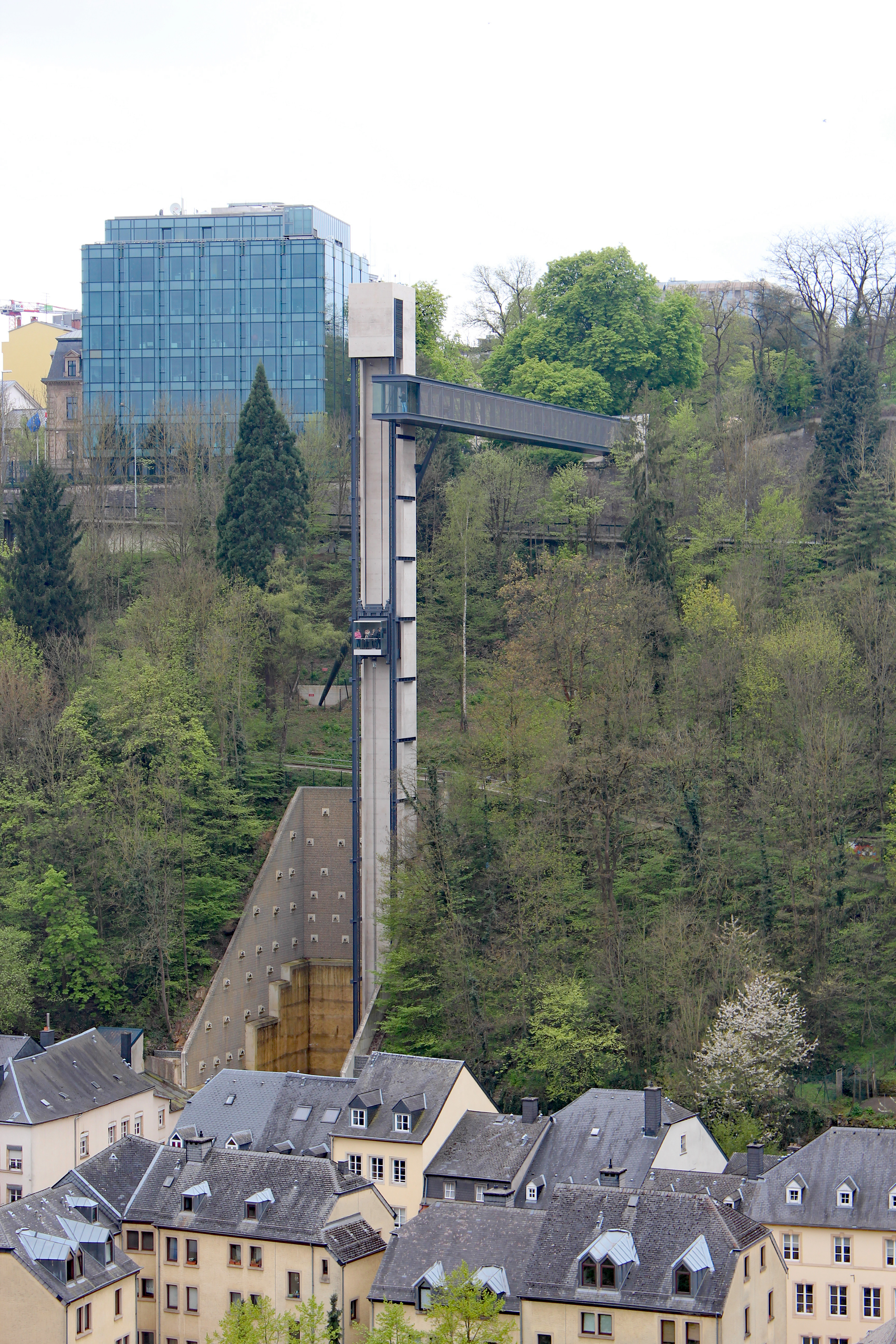 De Lift Pafendall-Uewerstad